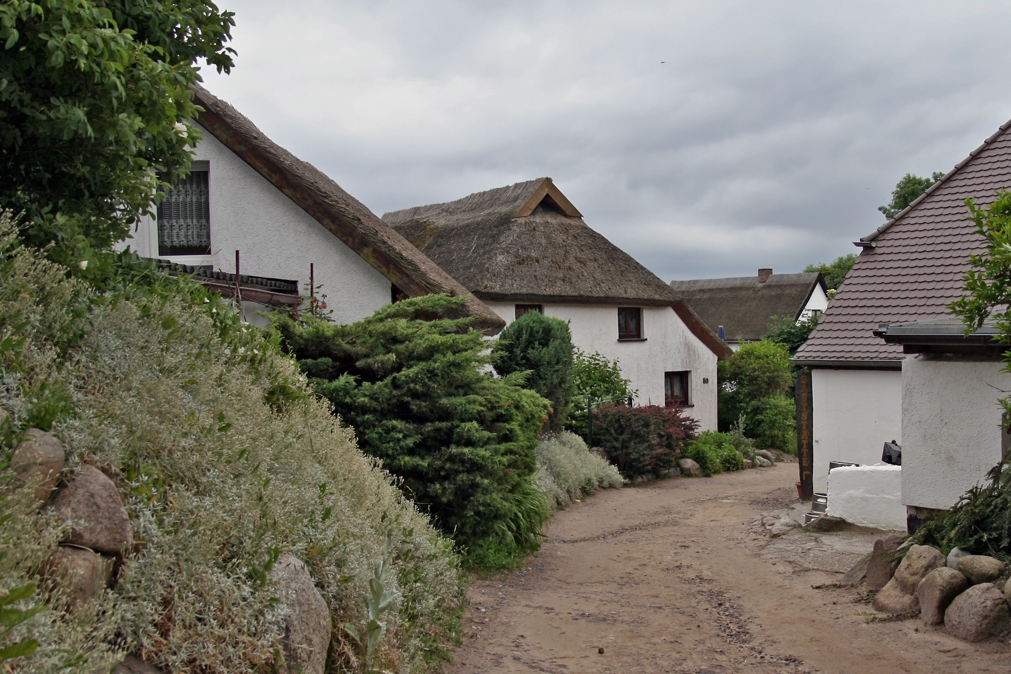 Vitt (Ruegen island)